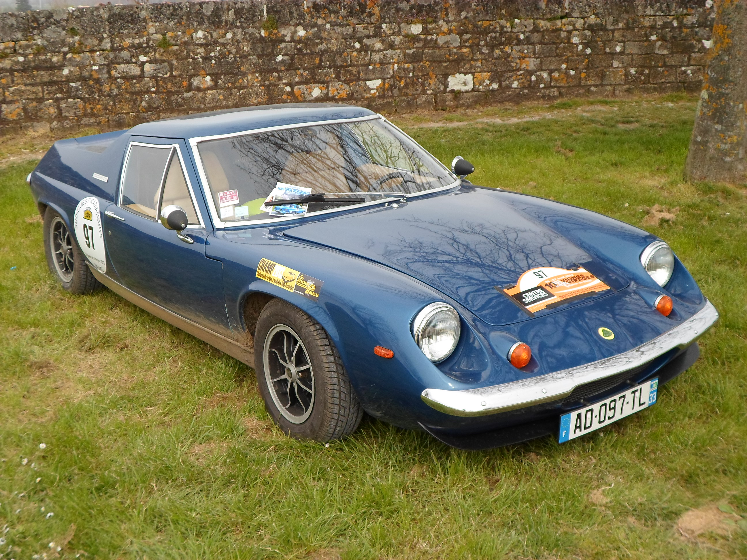 Lotus Europa Blaye 2013